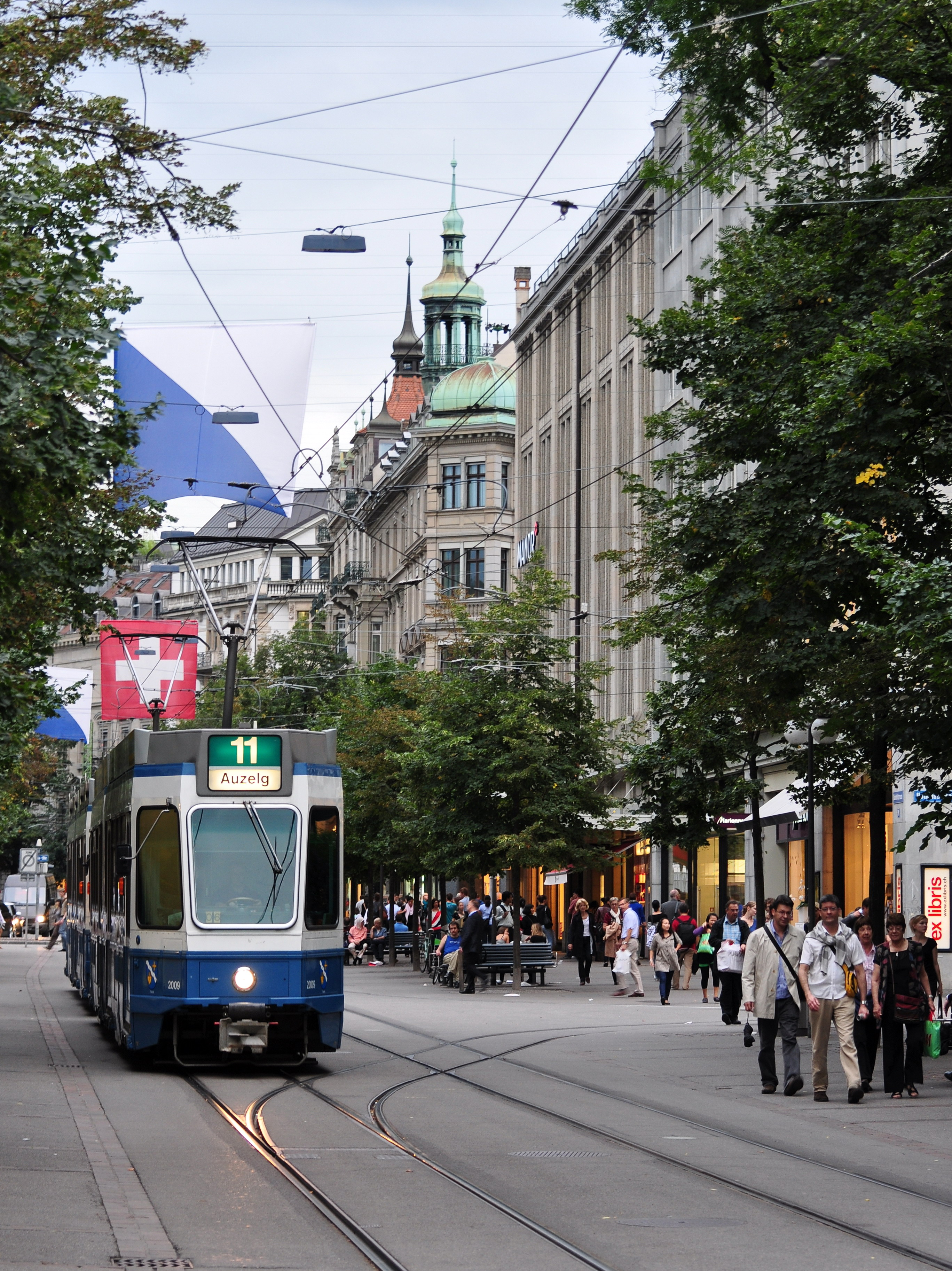 Bahnhofstrasse in Zürich (Switzerland), as seen from Beatengasse towards Uraniastrasse / Rennweg